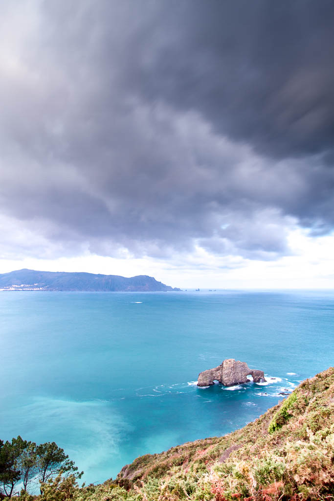 Peñón conocido como "Penafurada" por los huecos que el mar ha abierto en él